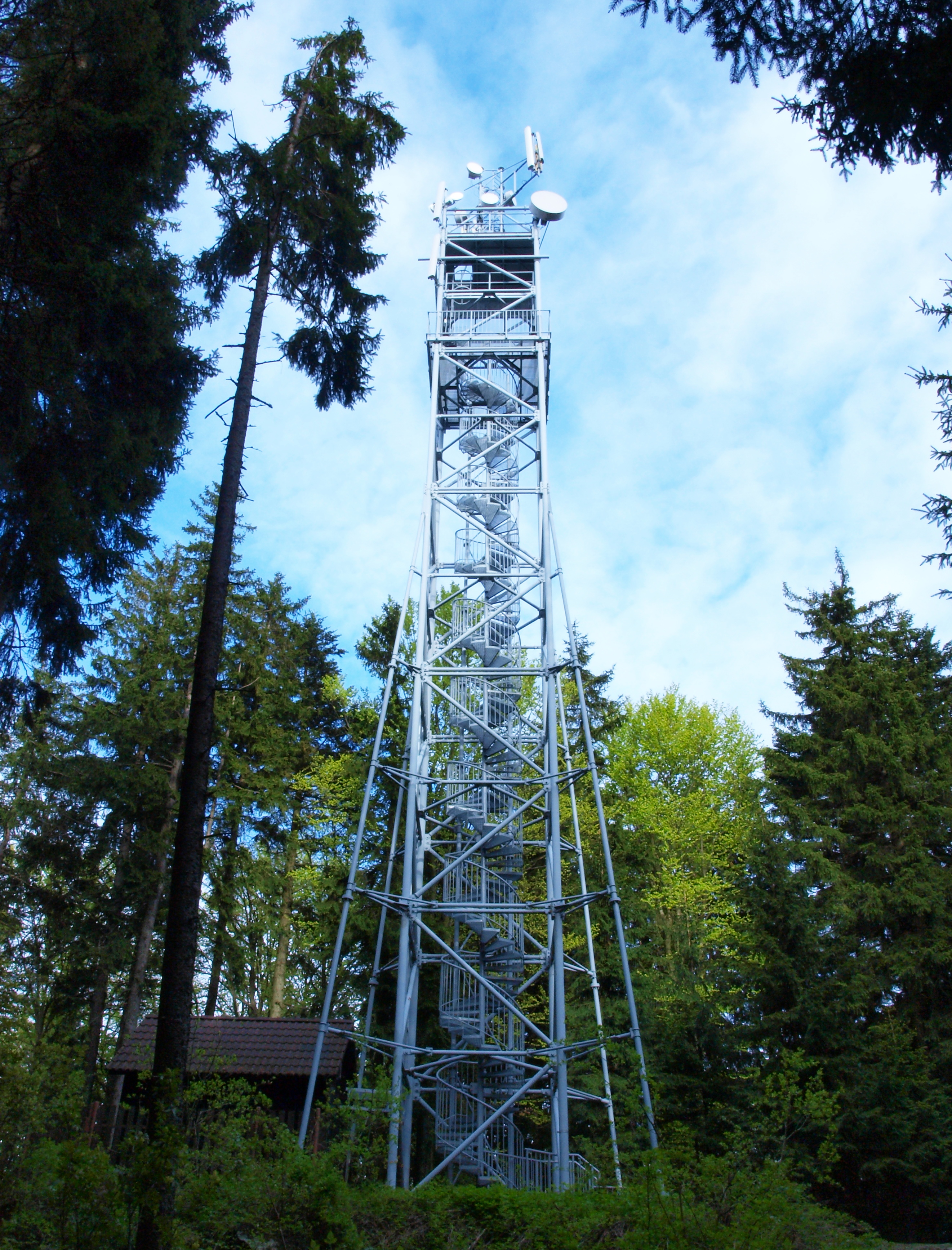 Česky: Radiotelekomunikační stožár na vrcholu Kraví hory v Novohradských horách je zároveň rozhlednou na Novohradsko i Třeboňskou pánev